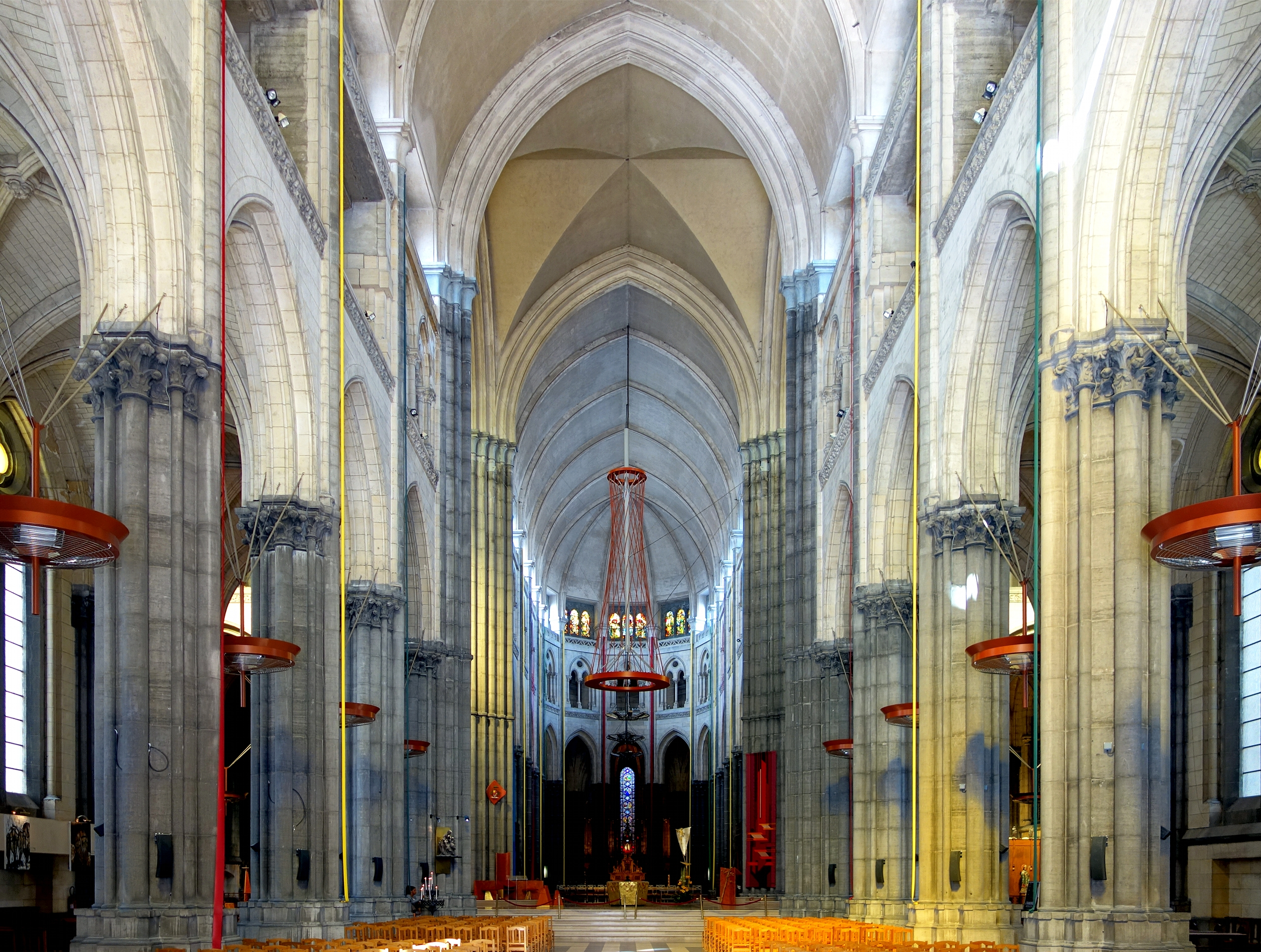 La nef de la Cathédrale Notre-Dame-de-la-Treille à Lille.